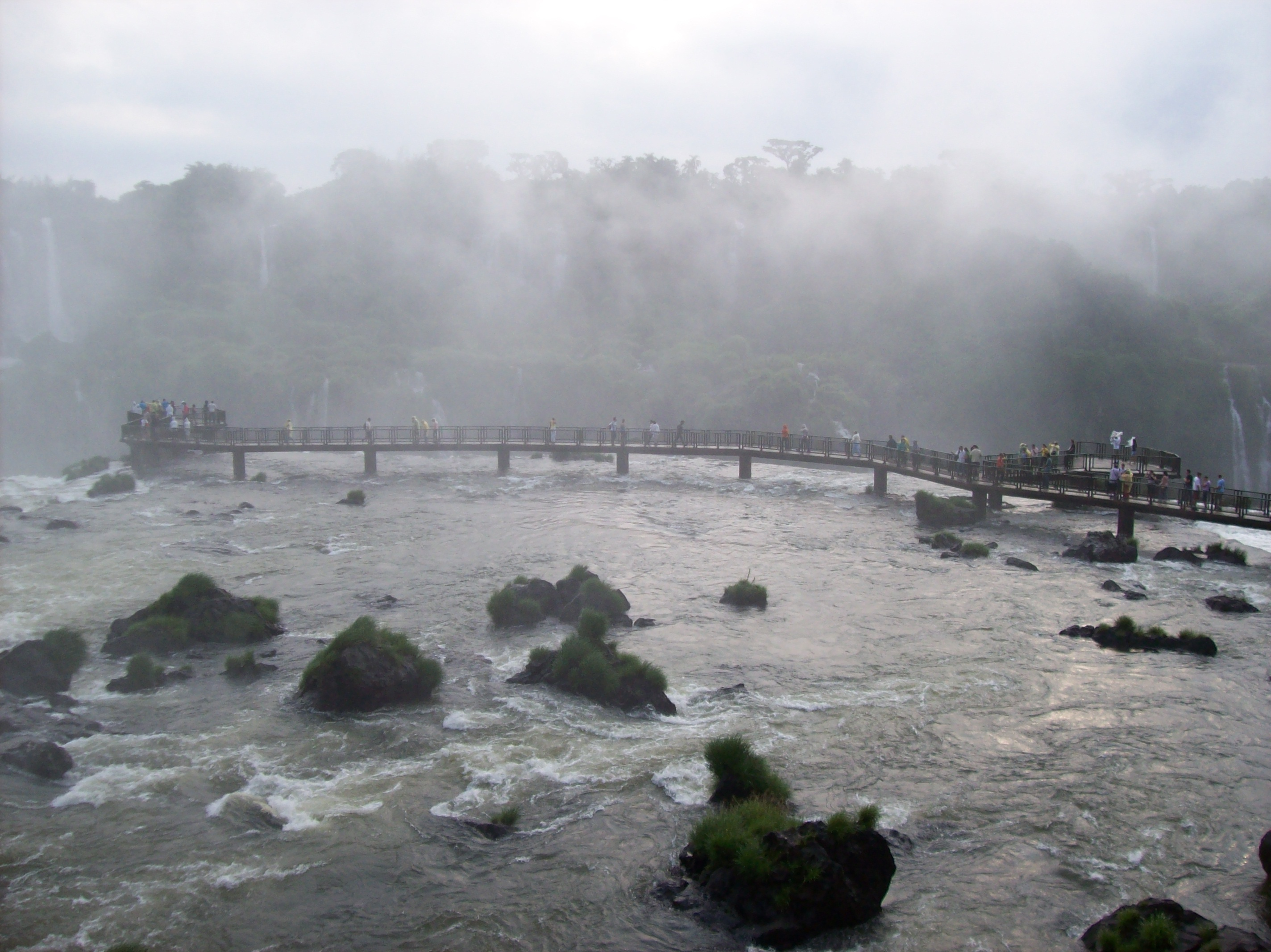 Pasarela de las Cataratas del Iguazú del lado brasileño. Esta pasarela se encuentra entre los saltos Floriano y Santa María.